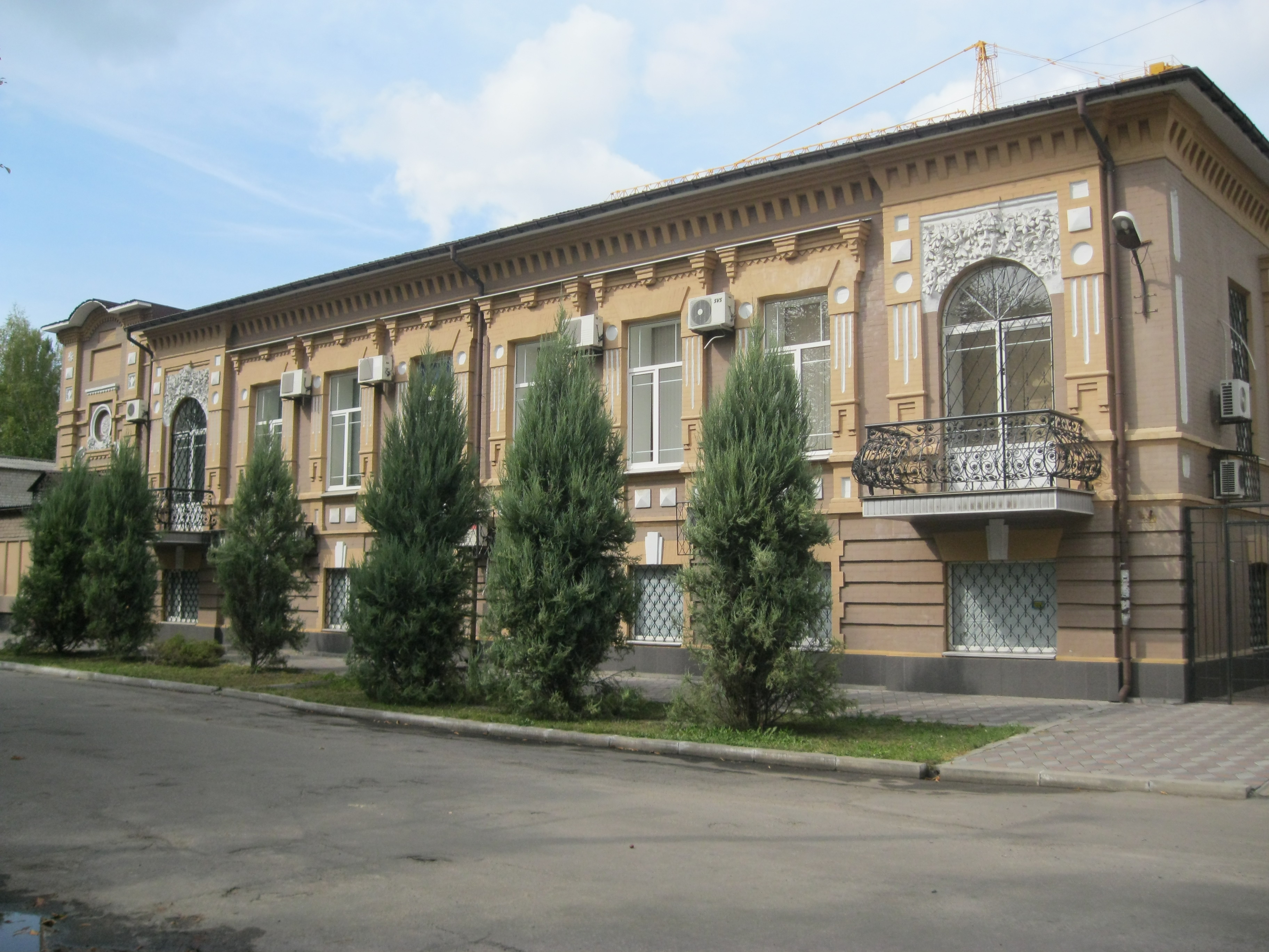 Будинок фабриканта Н. Рабіновича (Центр стандартизації, метрології ісертифікації), Кременчук, Вул. Софіївська, 73